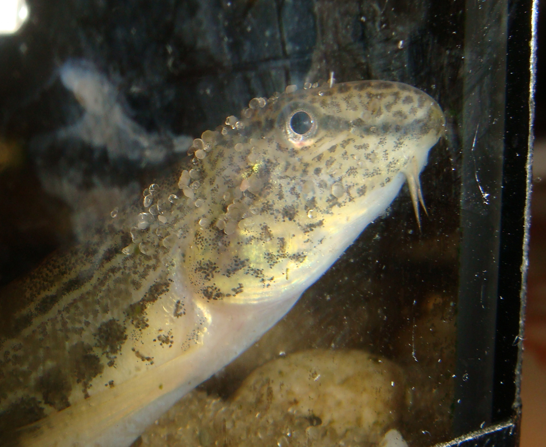 Щипавка танайська (Cobitis tanaitica) в акваріумі